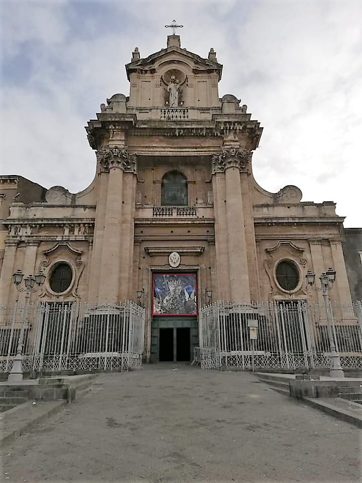 Facciata.